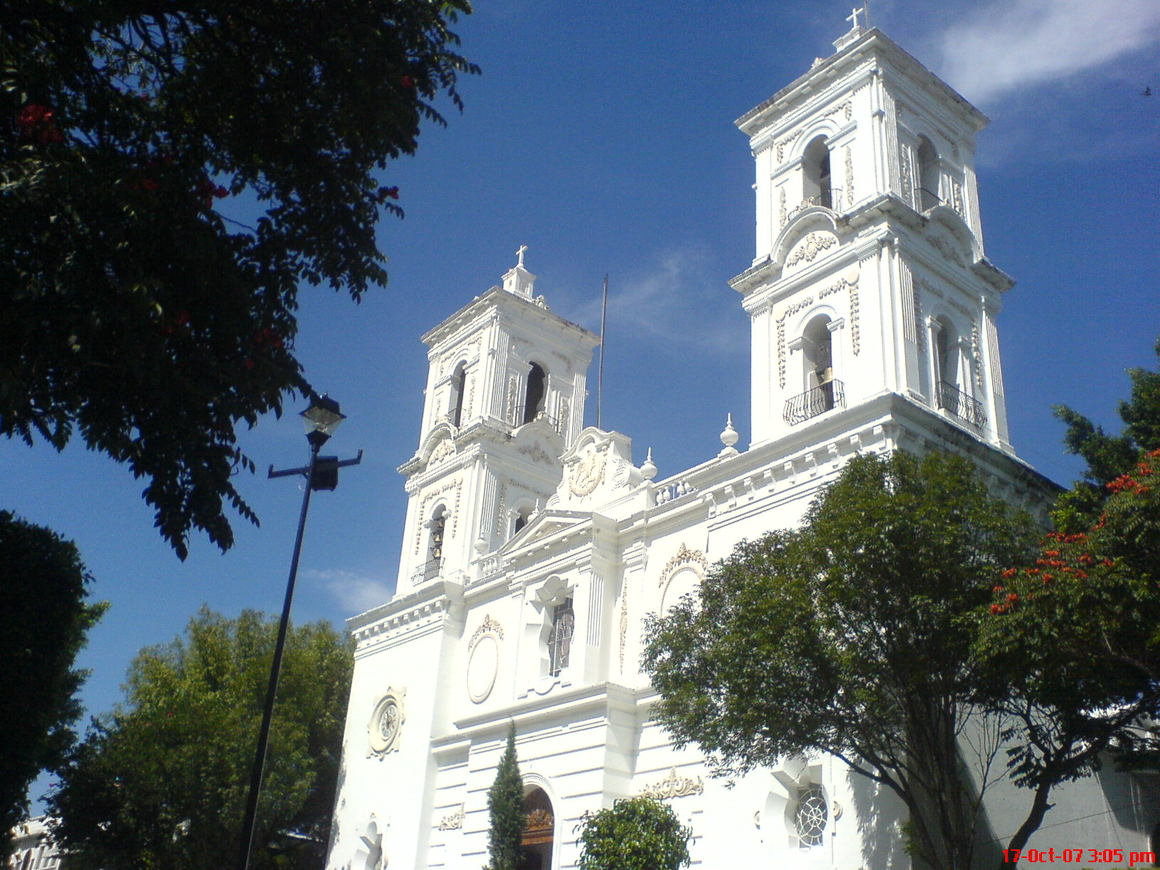 Catedral de Santa María de la Asunción en Chilpancingo.